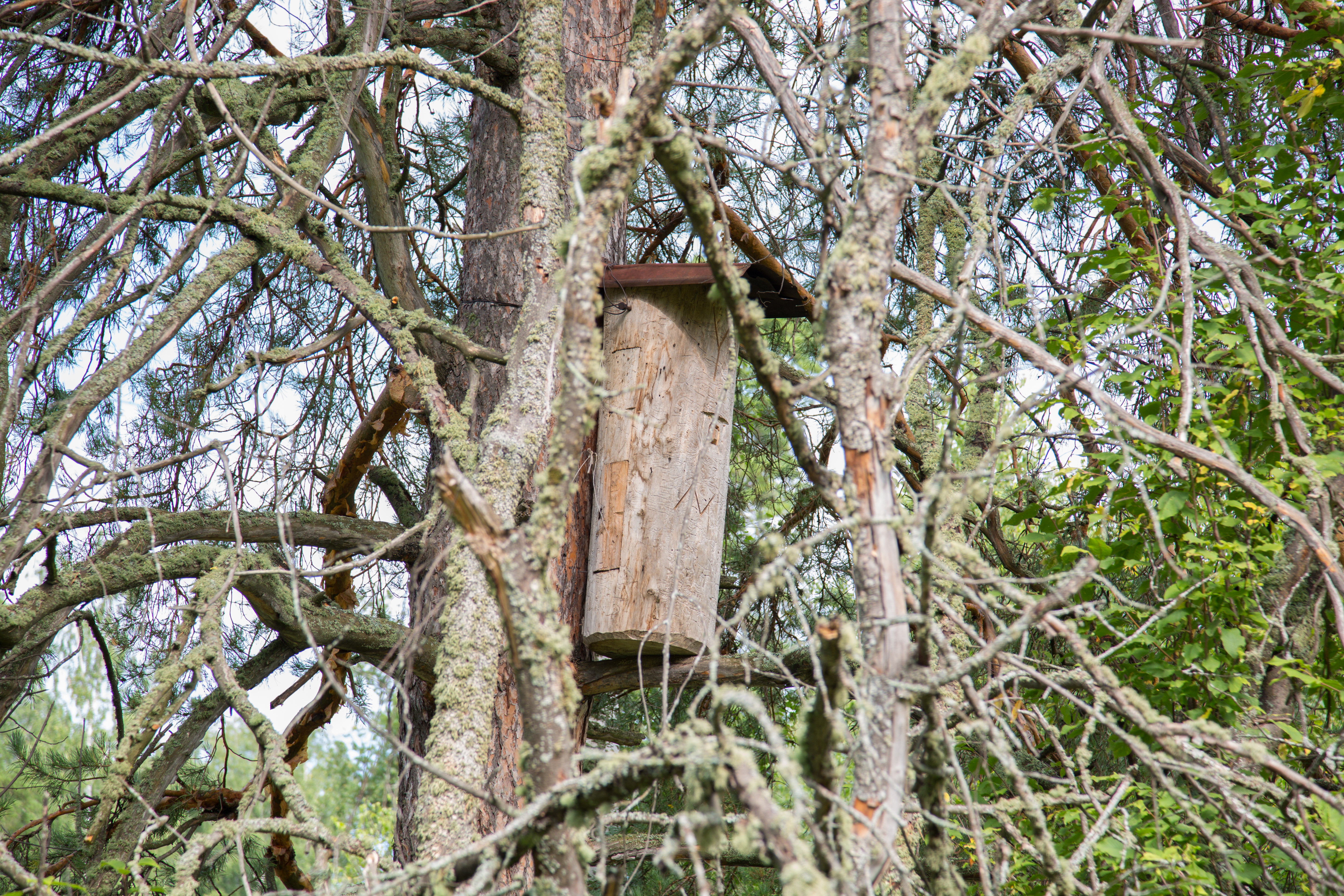 Шульган-Таш заповедник, Бурзянский район This image is related to the protected area of Russia number 0200105